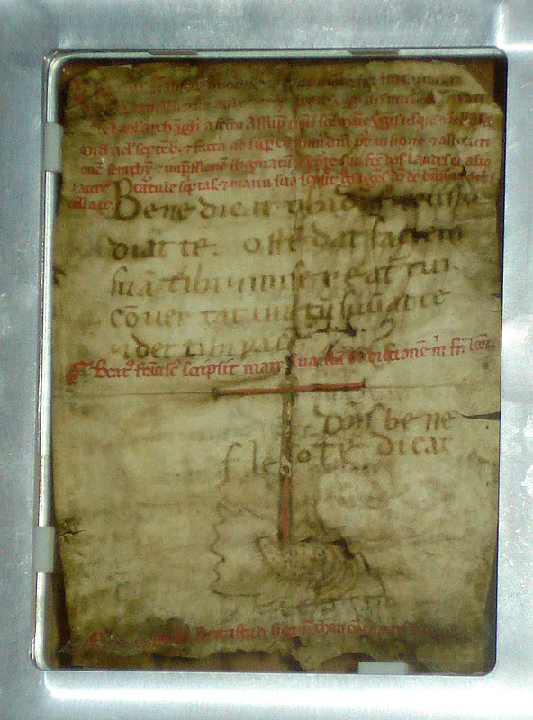 Bênção autógrafa de S. Francisco para o Irmão Leo